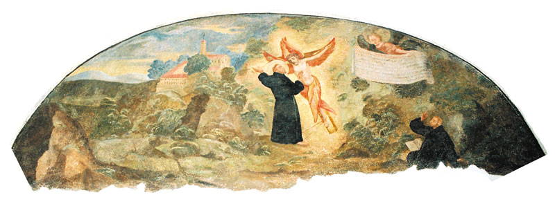 Пінскі кляштар. Роспісы XVIII ст. «Відзенне ўкрыжаванага серафіма»